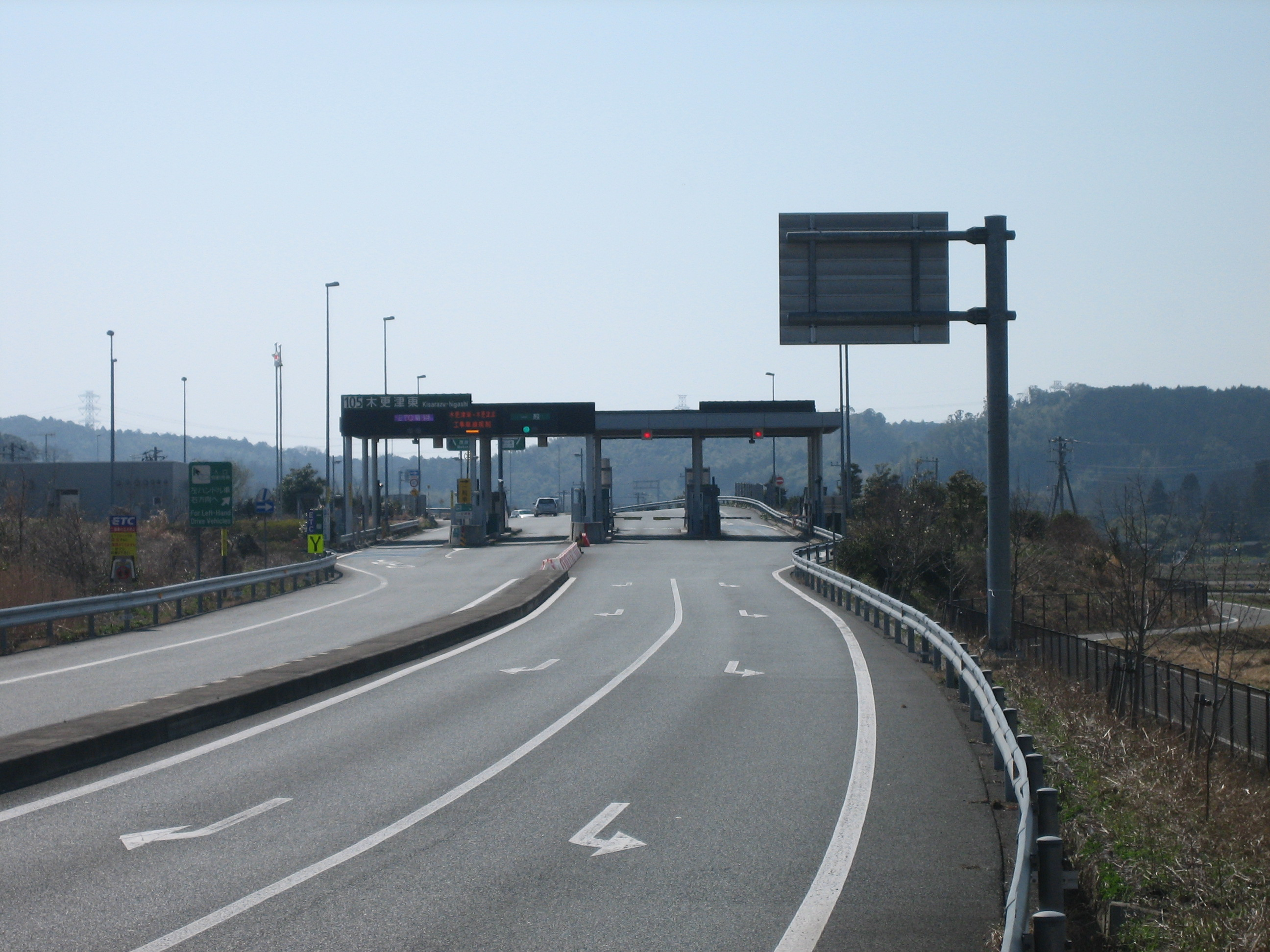 首都圏中央連絡自動車道木更津東インターチェンジ